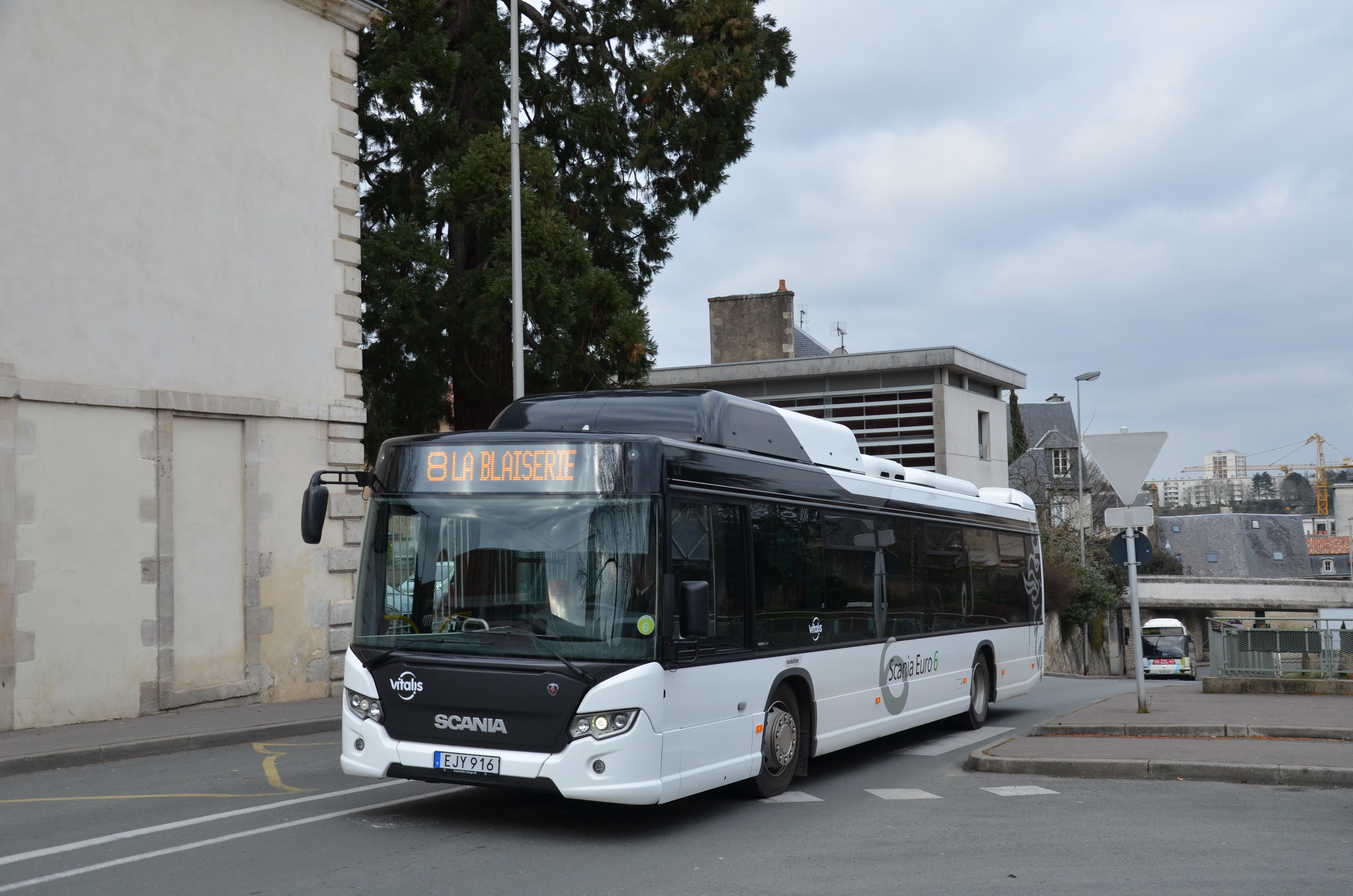 Scania CityWide12 de la ligne 8 du réseau VITALIS de Poitiers, près du pôle Notre-Dame.